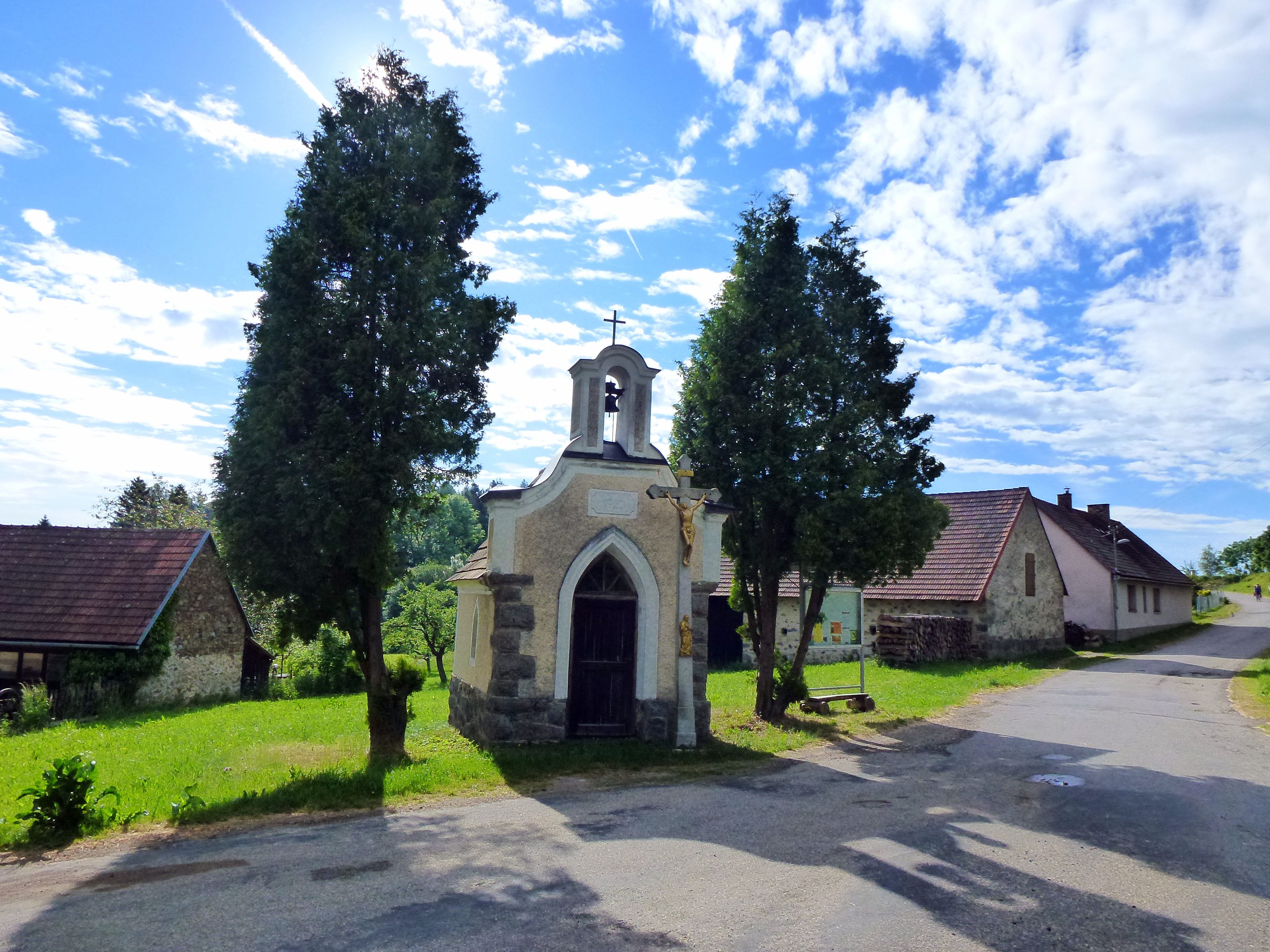 Záhoříčko